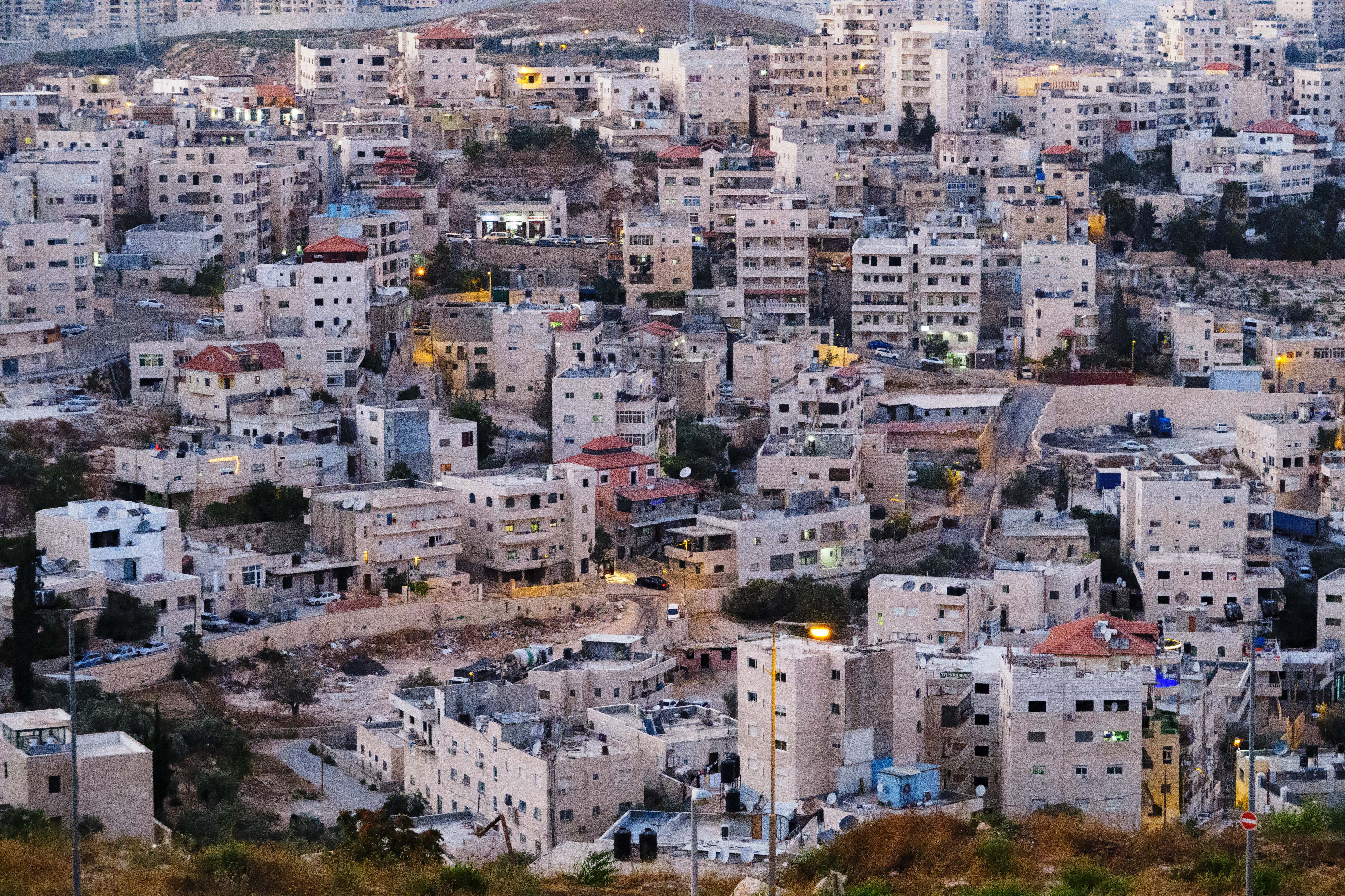 PowerShot G7 X Jerusalem